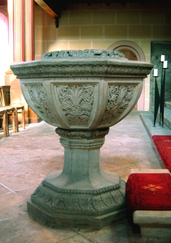 Sankt-Gertrauden-Kirche in Magdeburg-Buckau (Taufstein)